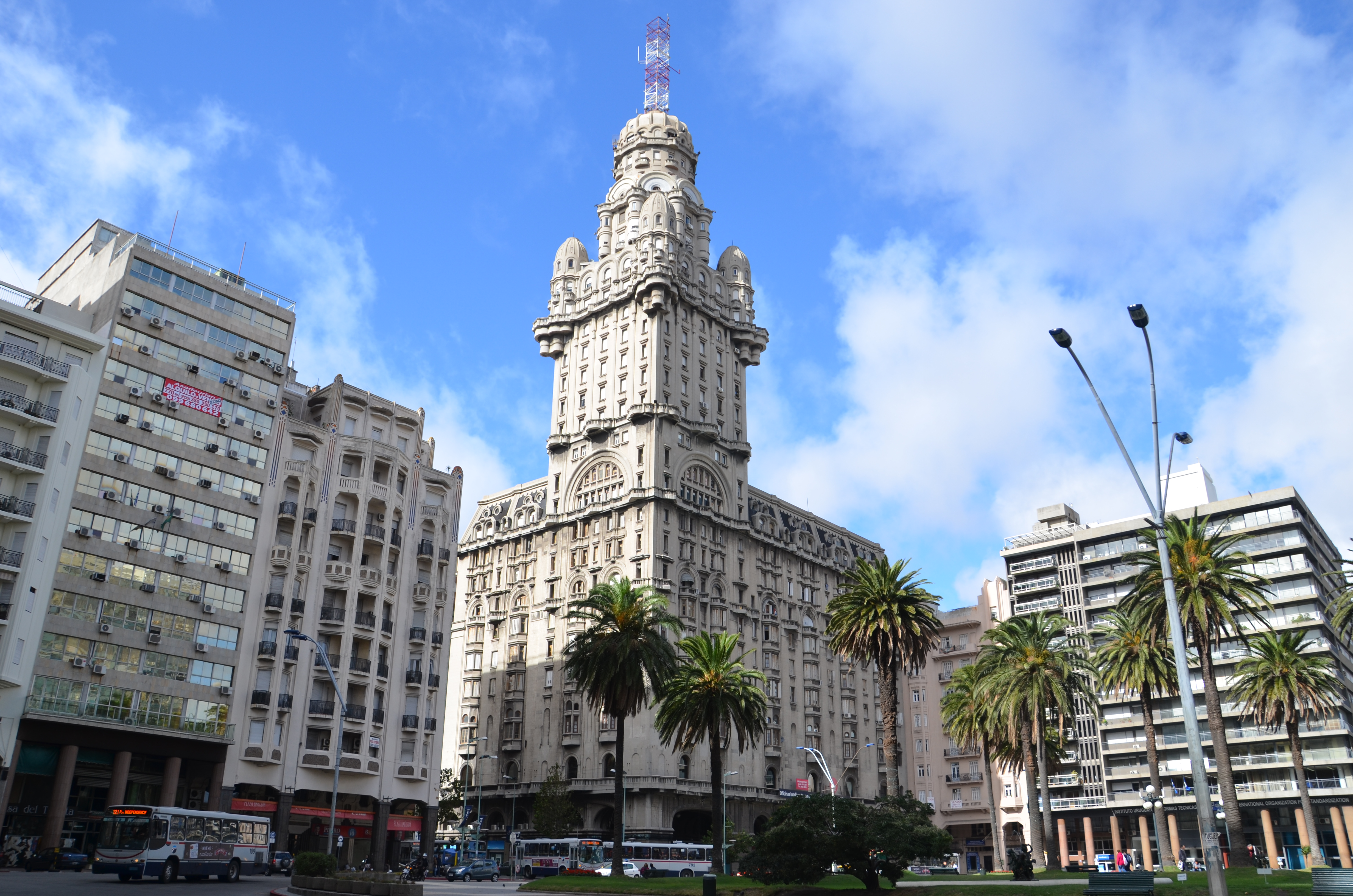 Palacio Salvo, Montevideo, Uruguay